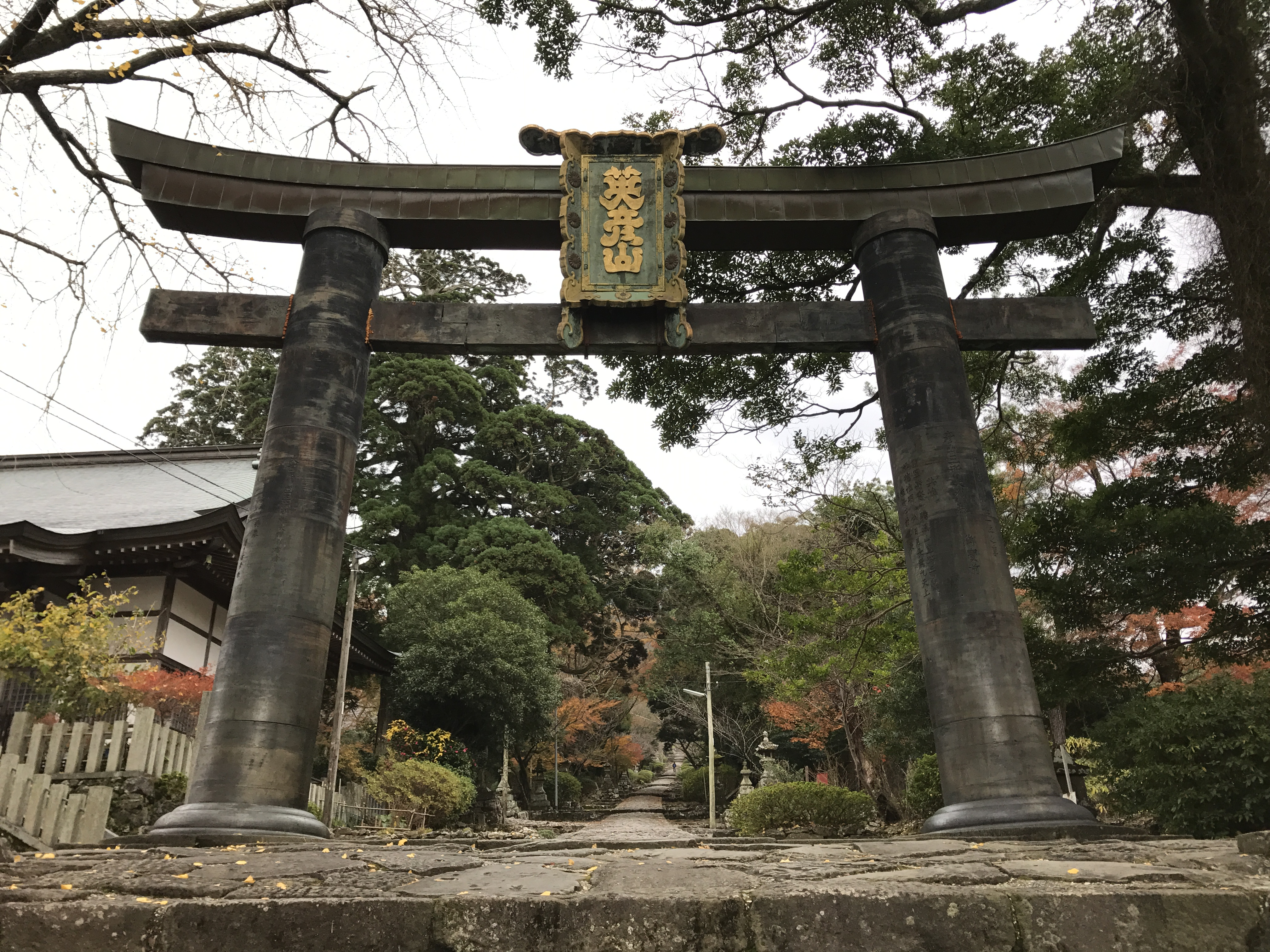 英彦山神宮の銅鳥居